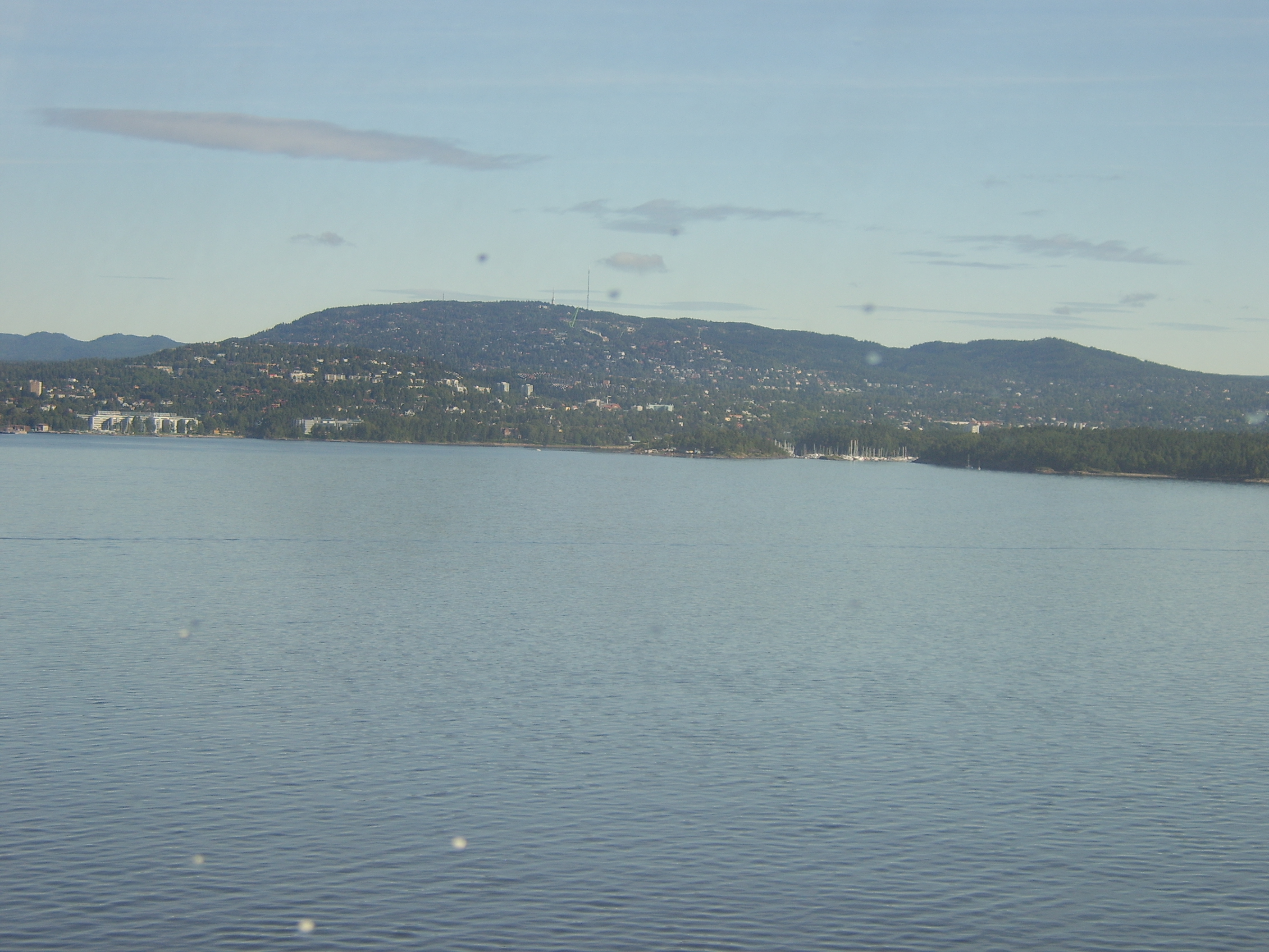 Lysakerfjorden; Oslofjord; Norway